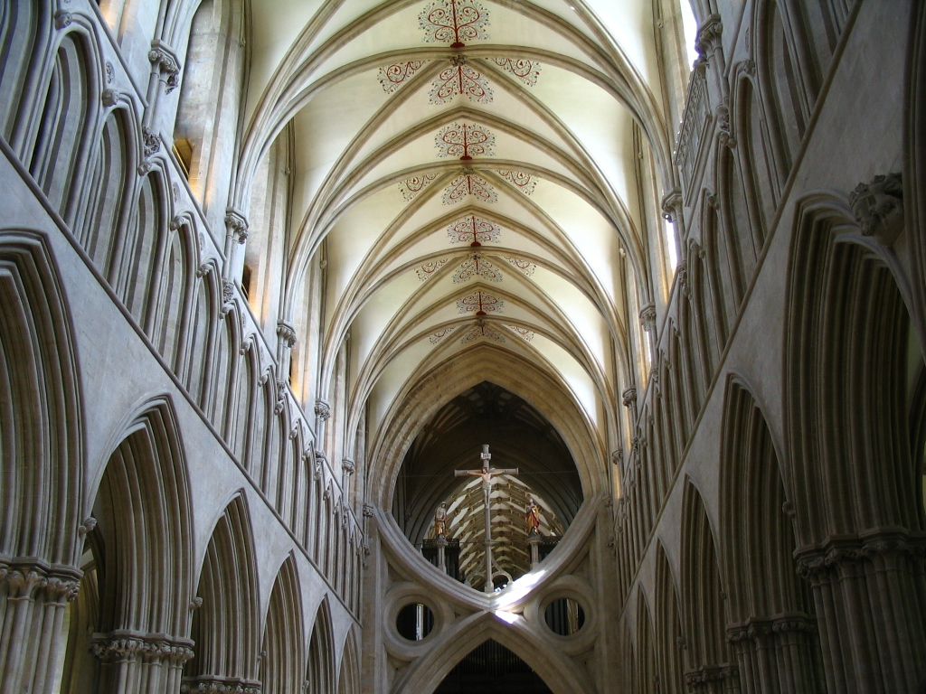 Intérieur de la cathédrale de Wells, Somerset, Angleterre.